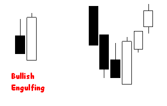 Analisi Tecnica, Candele giapponesi, Bullish Engulfing